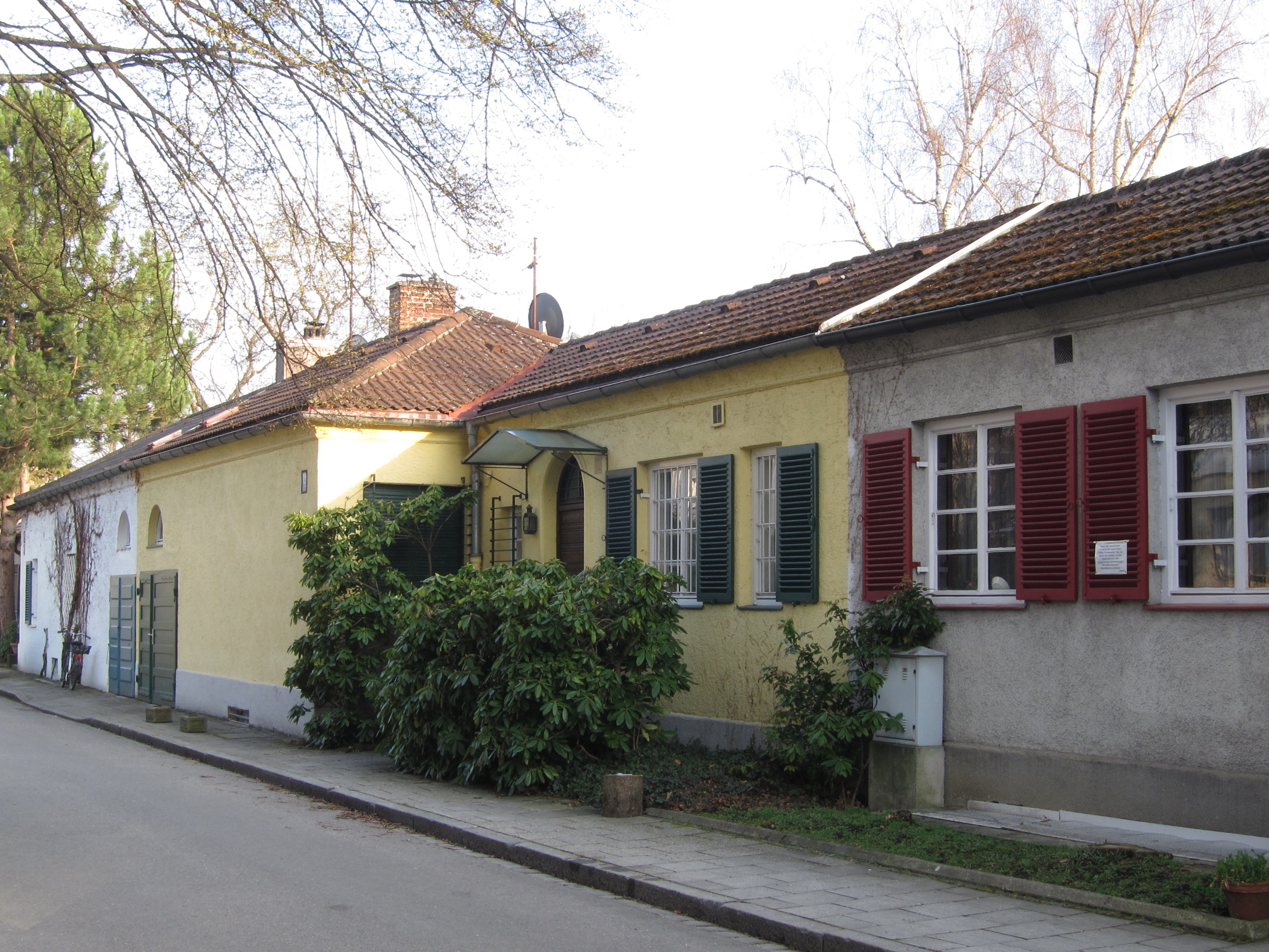 Neufahrner Straße 10-24 (gerade); Teilansicht: Atriumsiedlung von Ulrich Seek, 1931 vollendet; flach eingeschossige Bebauung eines Gevierts, bei der 16 L-förmige Hauseinheiten so angeordnet sind, dass sich drei geschlossene Atriumshöfe und am Abschluss gegen Westen und Osten je ein offener Gartenhof bilden. Die Wohnungen richten sich gegen die Gartenhöfe, die Längsseiten der Anlage sind weitgehend geschlossen durch Vor- und Rücksprünge gegliedert; zugehörig: Tittmoninger Straße 1-15 (ungerade).